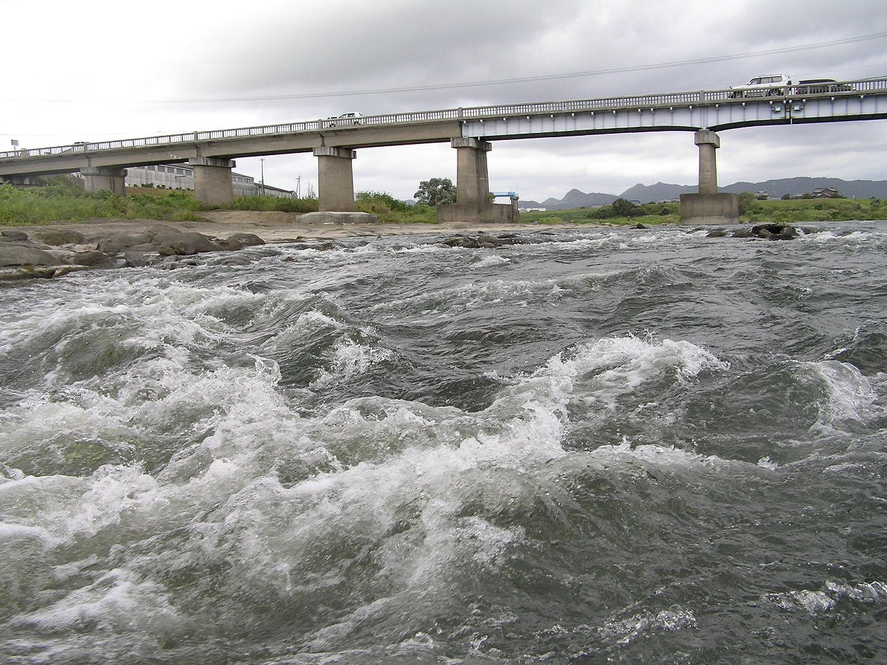 加古川万歳橋下流の瀬